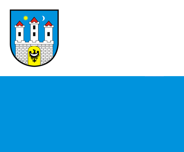 Flaga miasta Chojnów This image is in the public domain according to Article 4, case 2 of the Polish Copyright Law Act of February 4, 1994 (Dz. U. z 2019 r. poz. 1231 with later changes) "normative acts and drafts thereof as well as official documents, materials, signs and symbols are not subject to copyrights". Hence it is assumed that this image has been released into public domain. However in some instances the use of this image in Poland might be regulated by other laws.